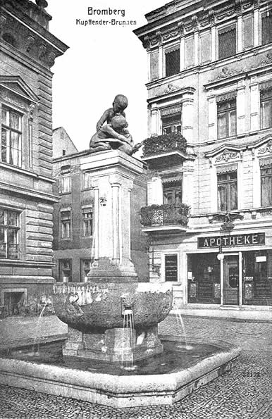 Rzeźba "Dzieci bawiące się z gęsią" w Bydgoszczy